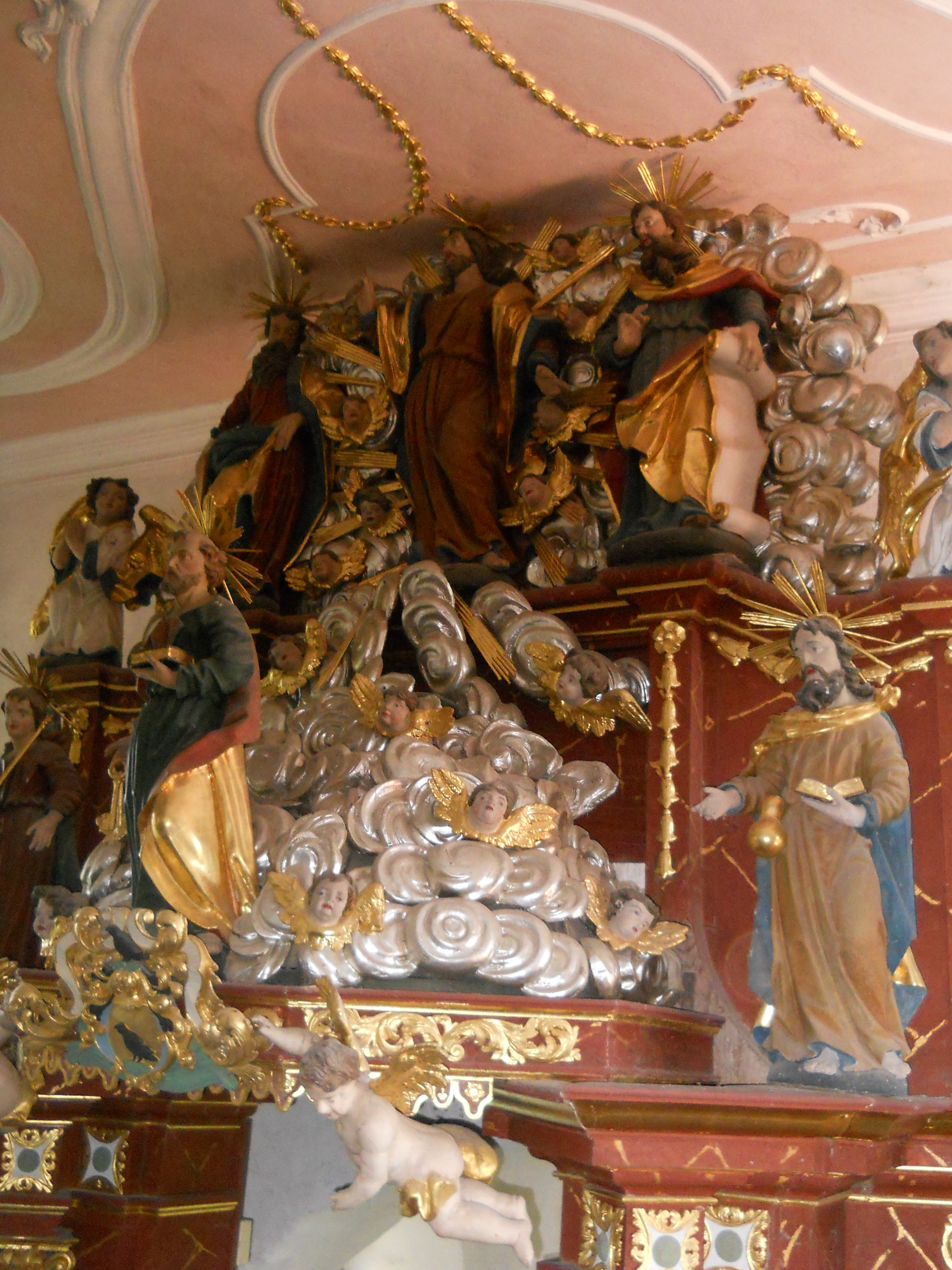 Klausstein-Kapelle bei Ahorntal in der Fränkischen Schweiz, Altar (Detail)